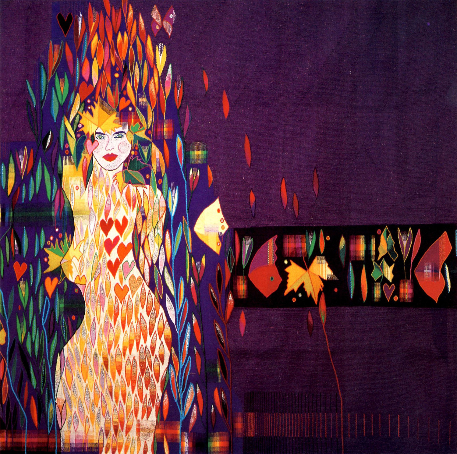 "Damunt de tu només les flors", tapís, 210x300 cm., Carles Delclaux, 1981